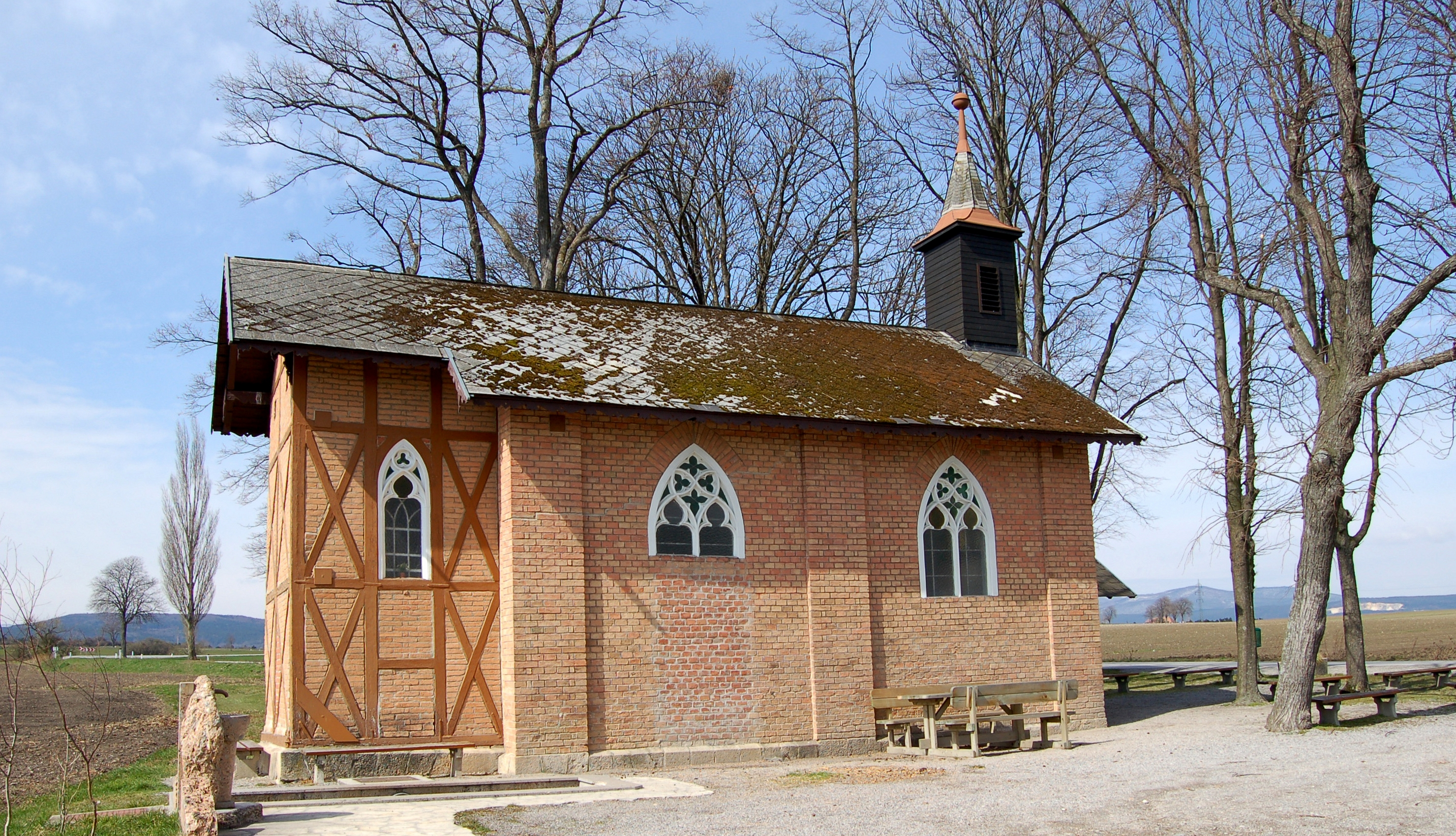 Heilsamer Brunnen, ein Wallfahrtsort in Leobersdorf, Niederösterreich. Blick nach NW